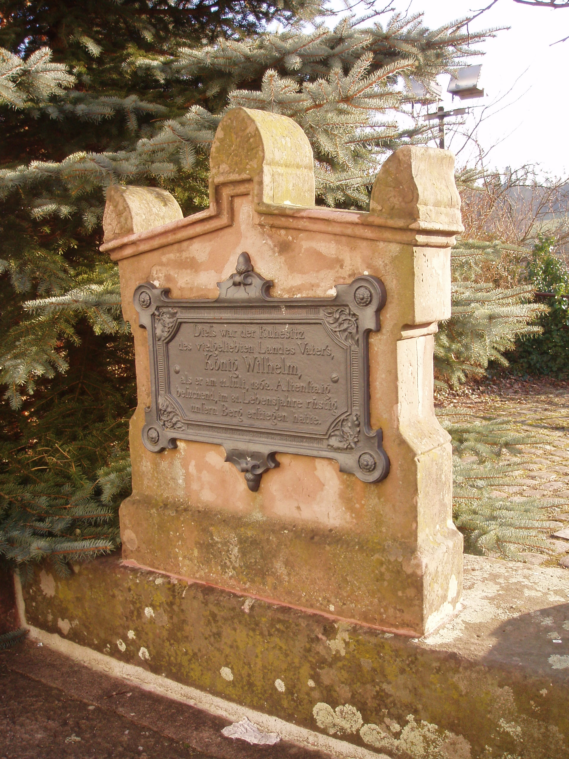 Erinnerungstafel in Altensteig: Besuch König Wilhelm